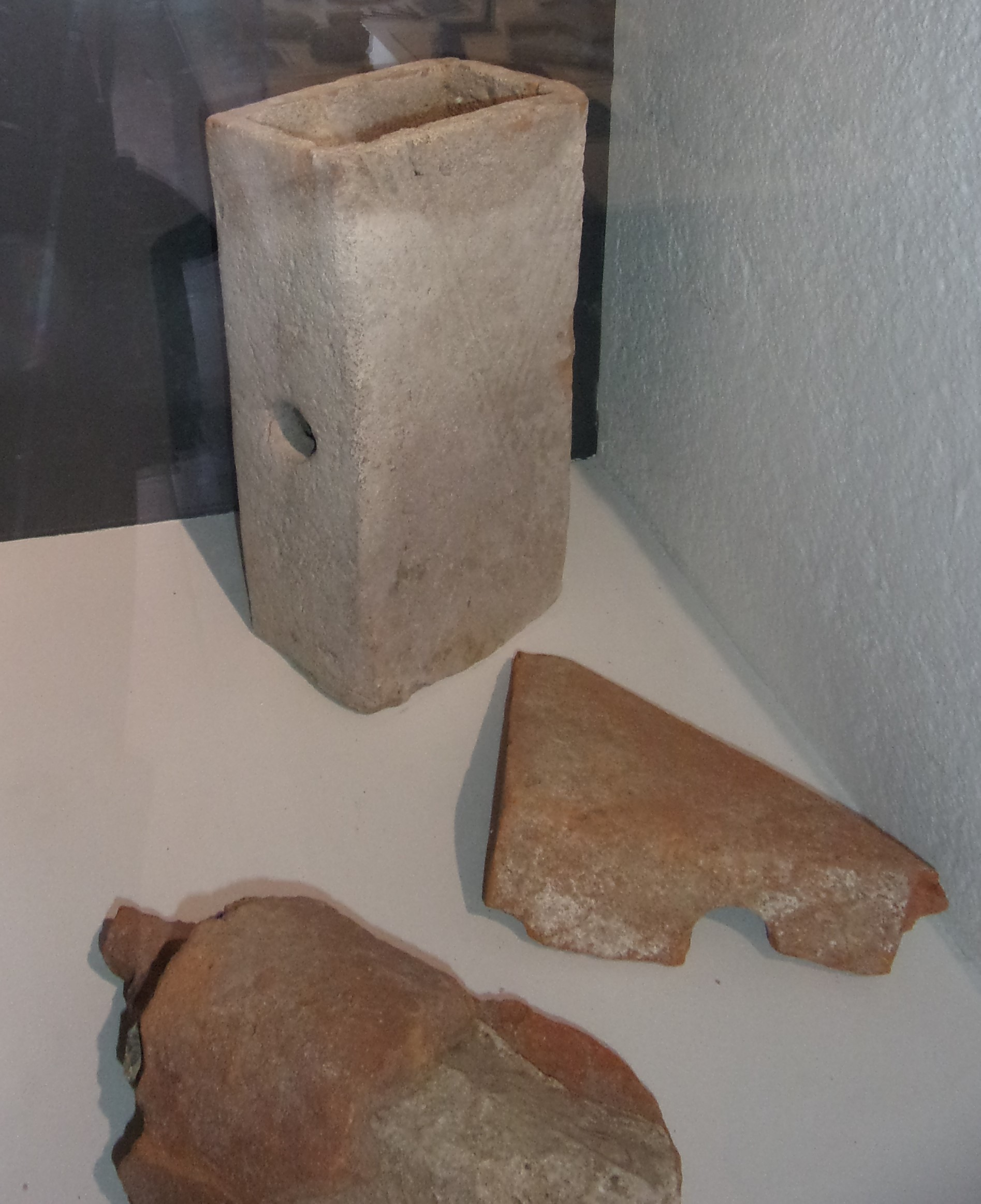 Tubuli en terre cuite des thermes de Cinais